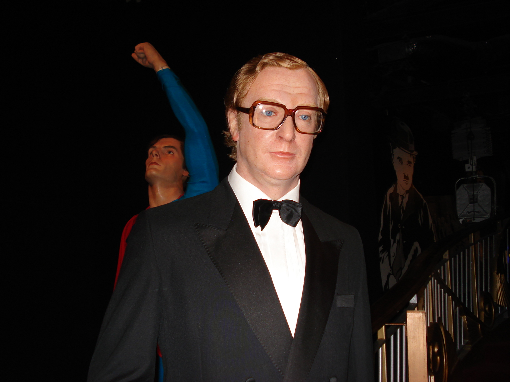 Mme Tussaud museum